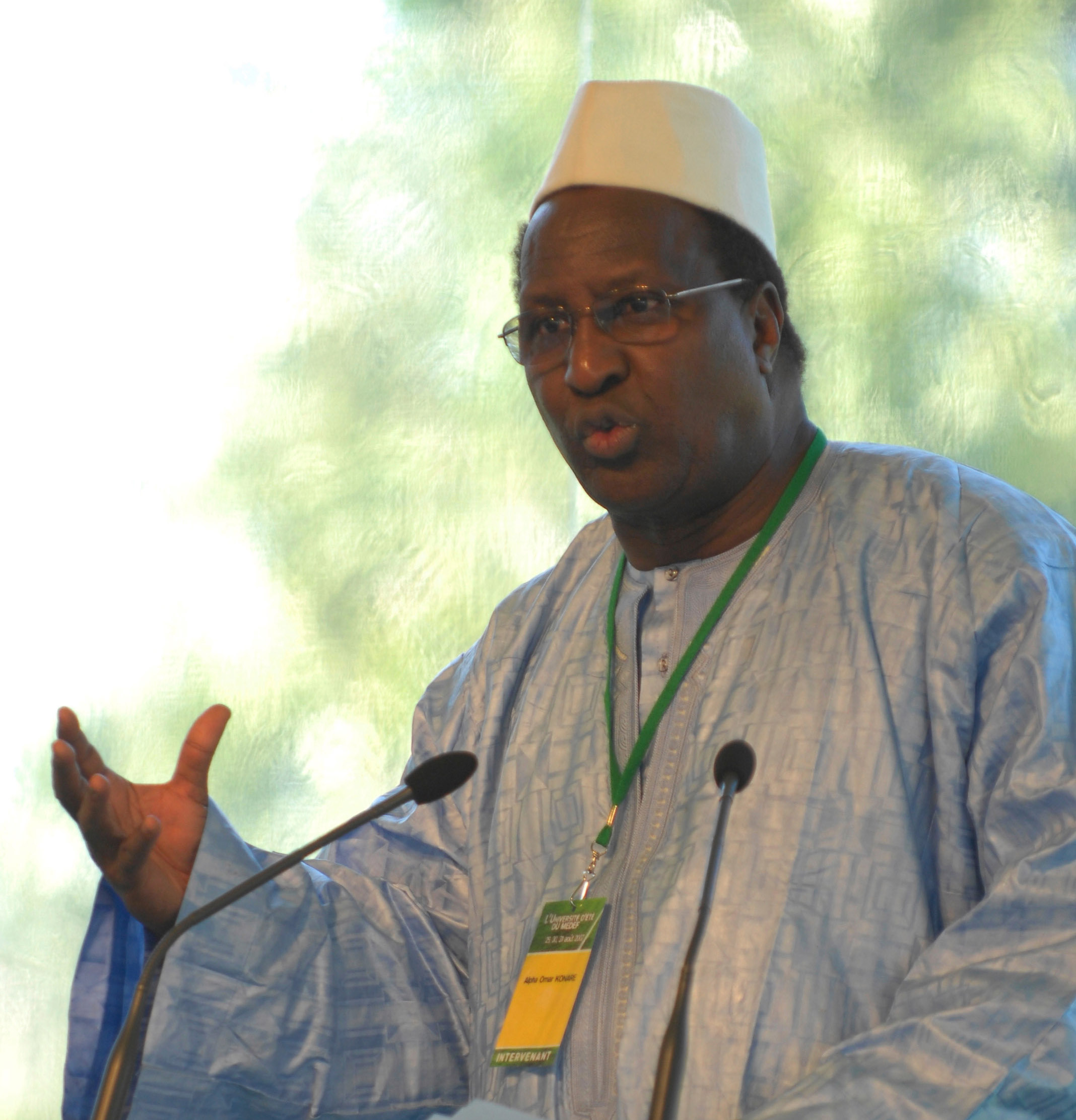 Alpha Oumar Konaré at the MEDEF Université d'été